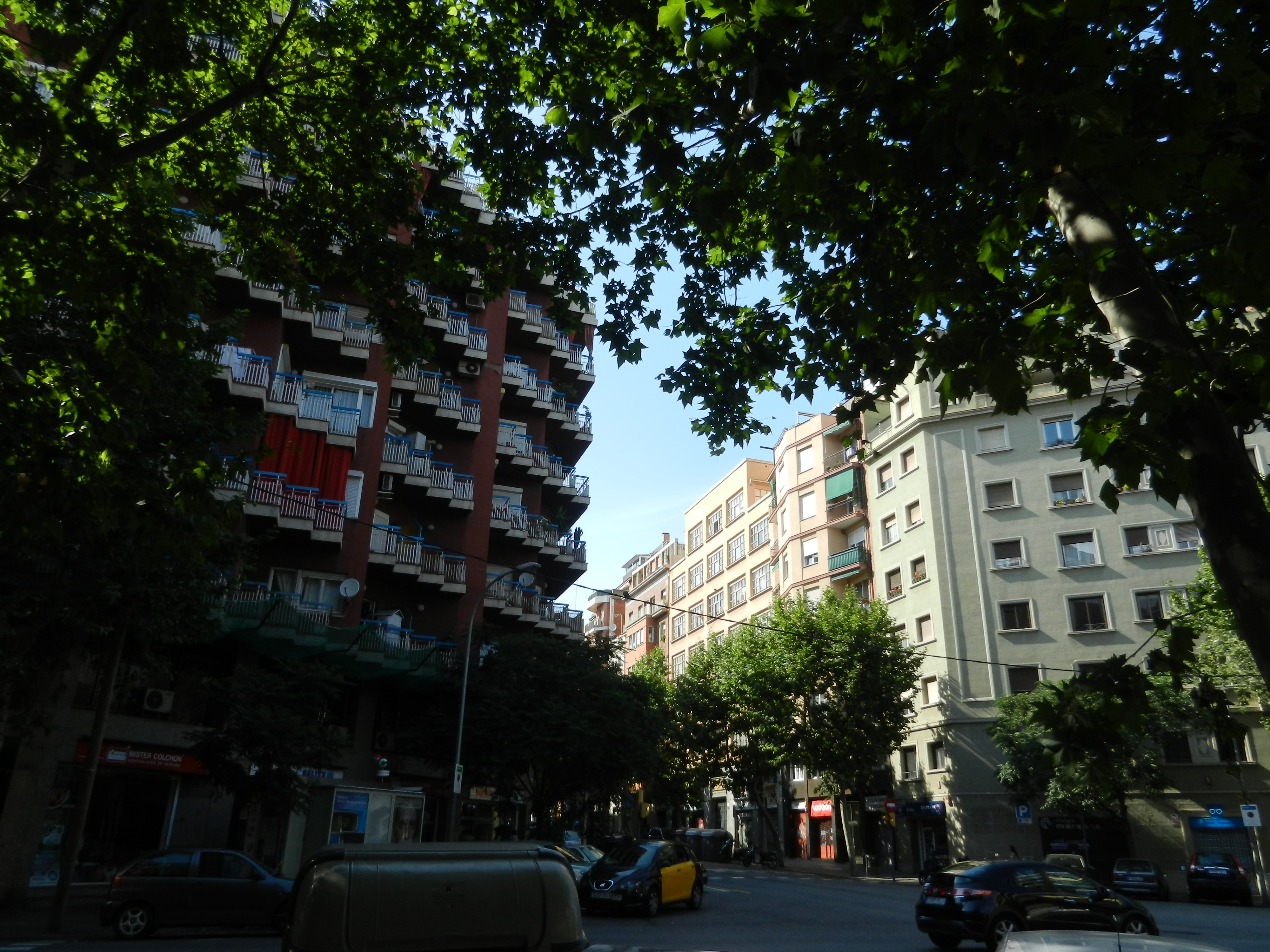 зеленые улицы. Carrer Lepant amb Valencia